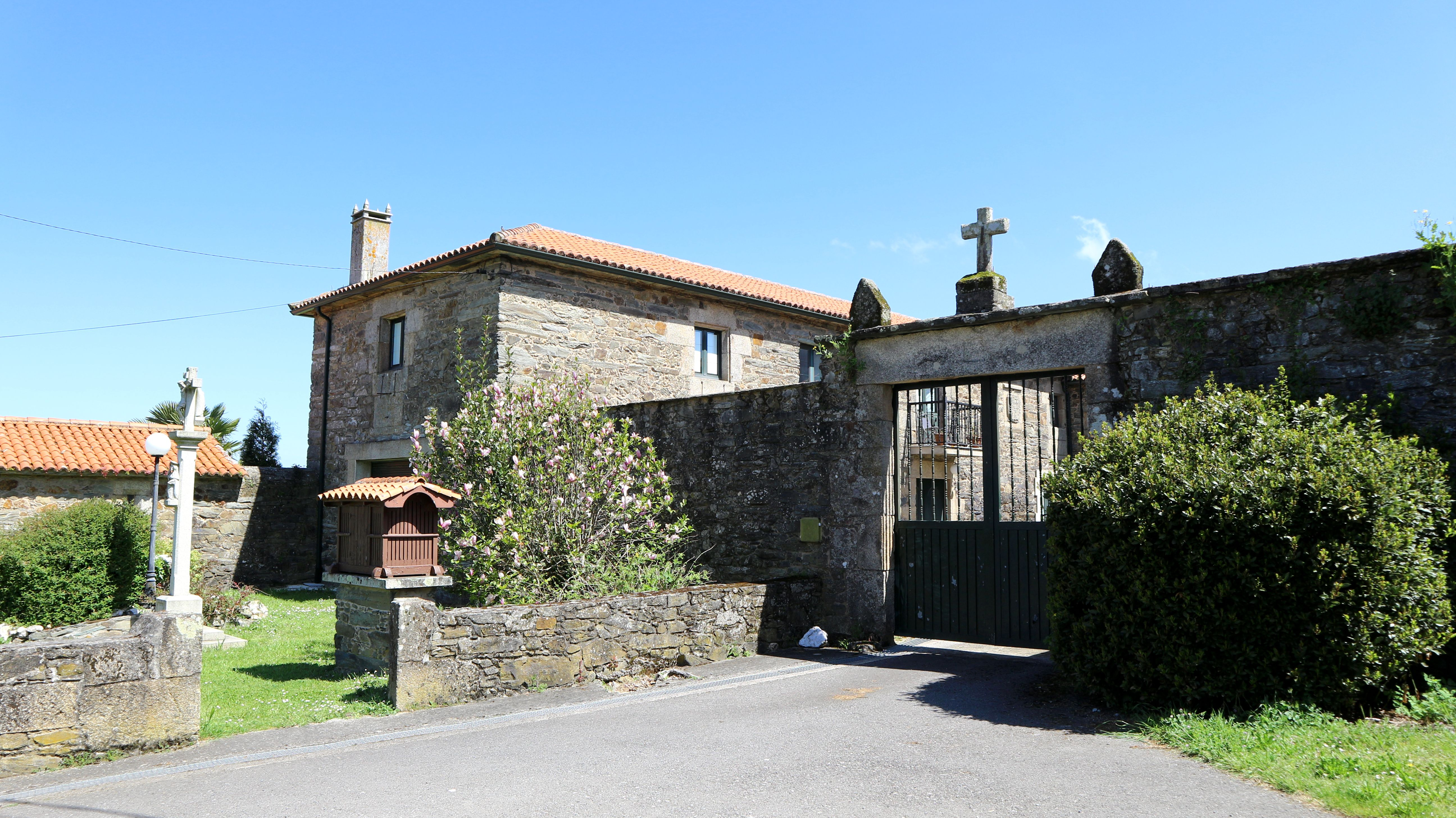 Pazo da Cerca, Cullergondo, Abegondo.